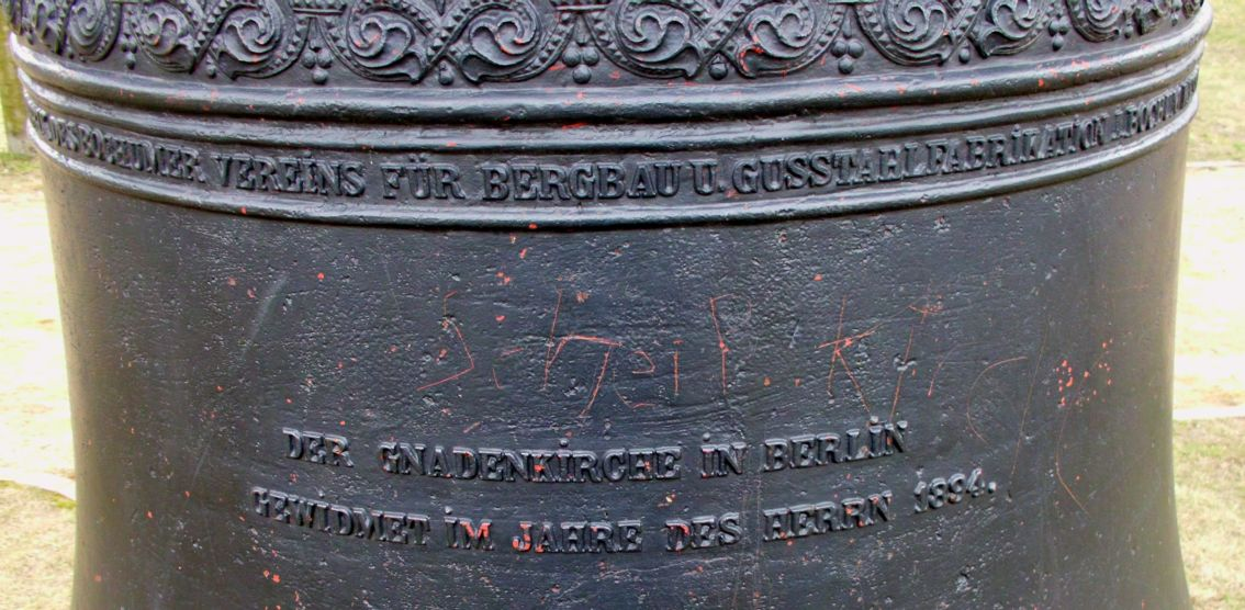 Auguste-Viktoria-Glocke der Gnadenkirche Berlin (Mitte) auf dem Invalidenfriedhof Berlin, Detail